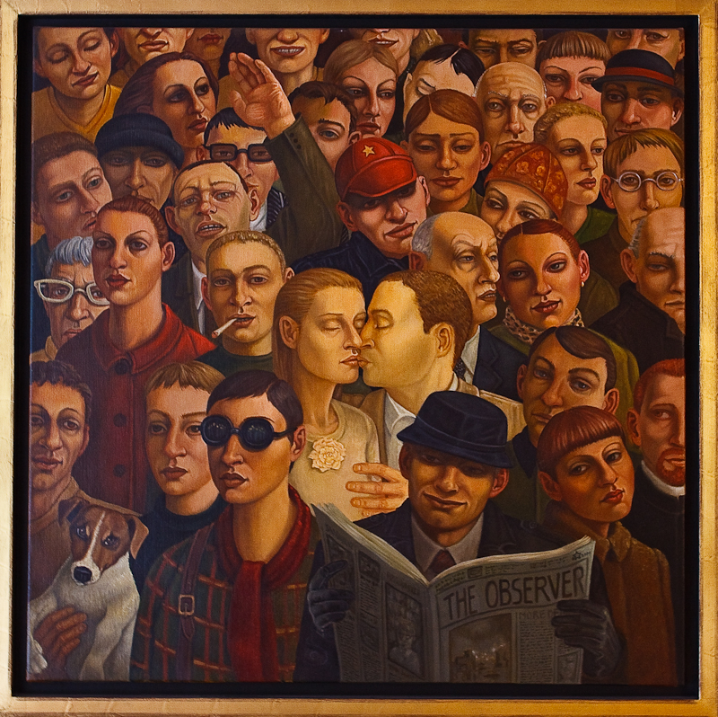 Bernardien Sternheim De kus 2001 olieverf op doek Een kussend paar tussen mensenmassa Bernardien Sternheim The kiss 2001 oil on canvas A couple kissing in a crowd